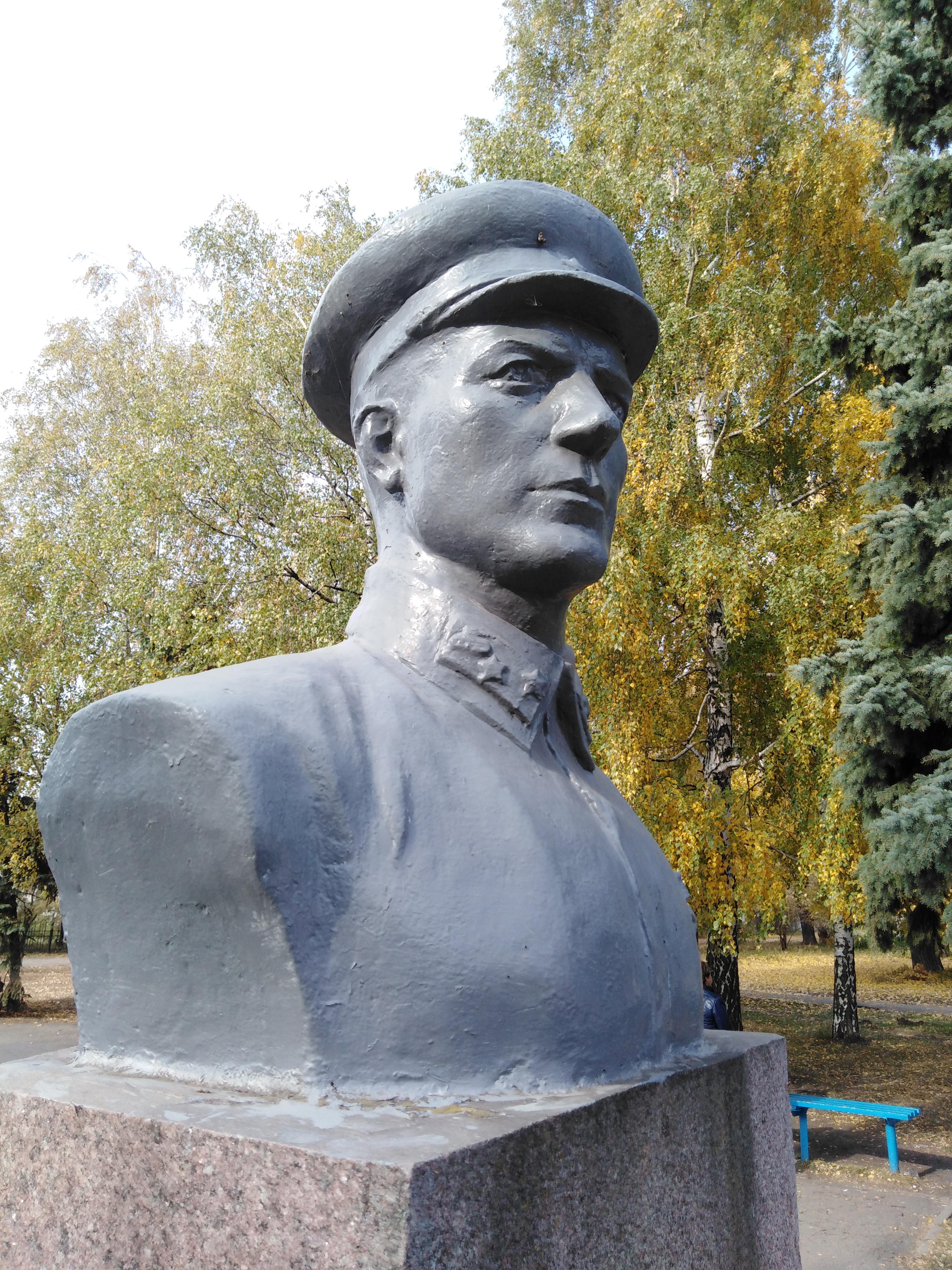 Копцов, Василий Алексеевич.